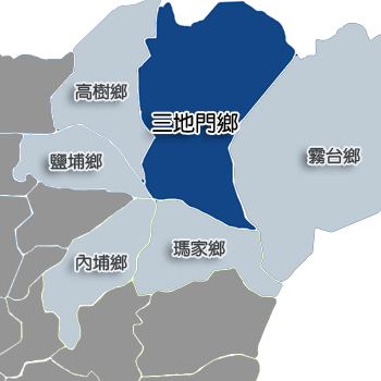 屏東縣三地門鄉相對位置。